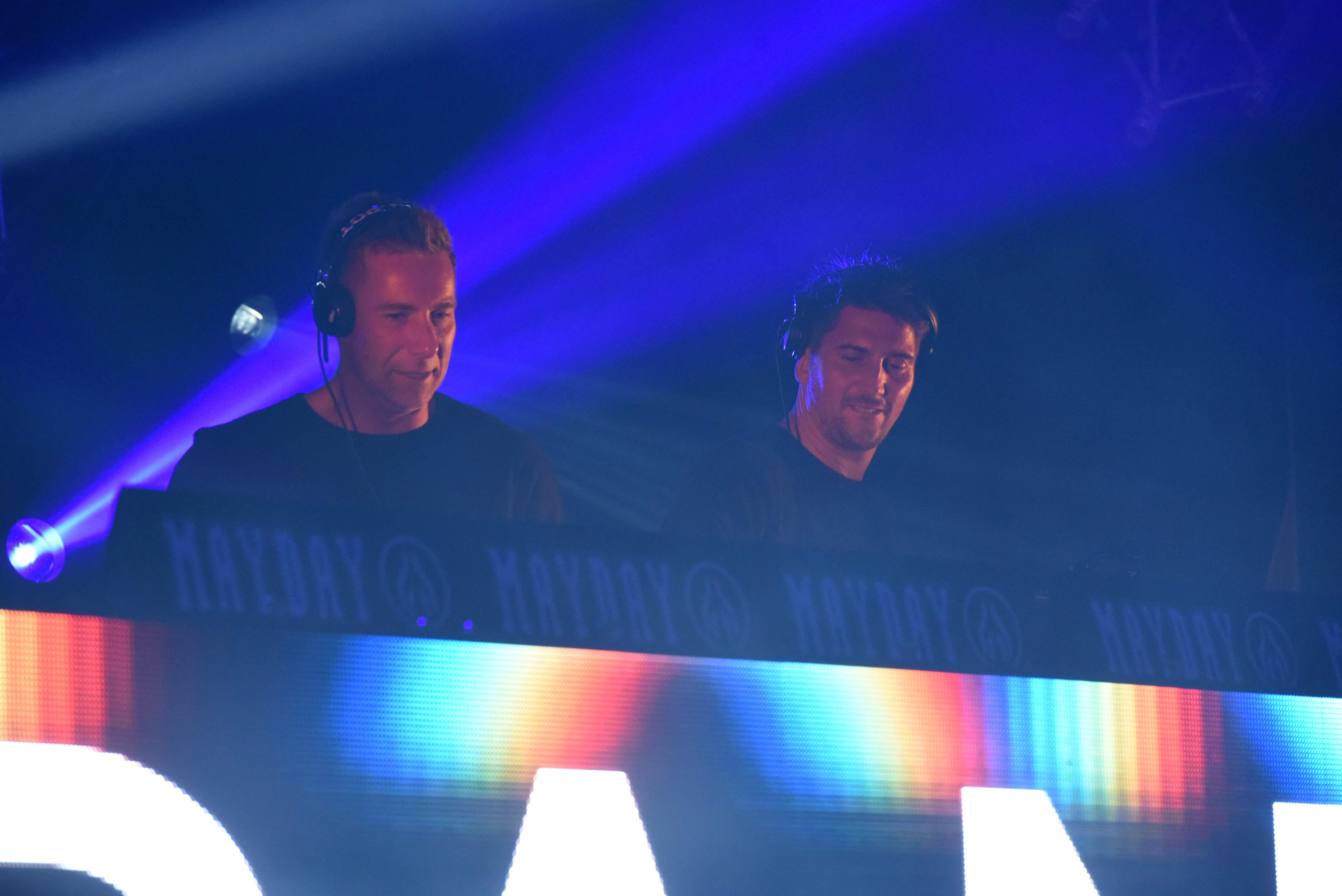 Pan Pot @ Mayday 2019